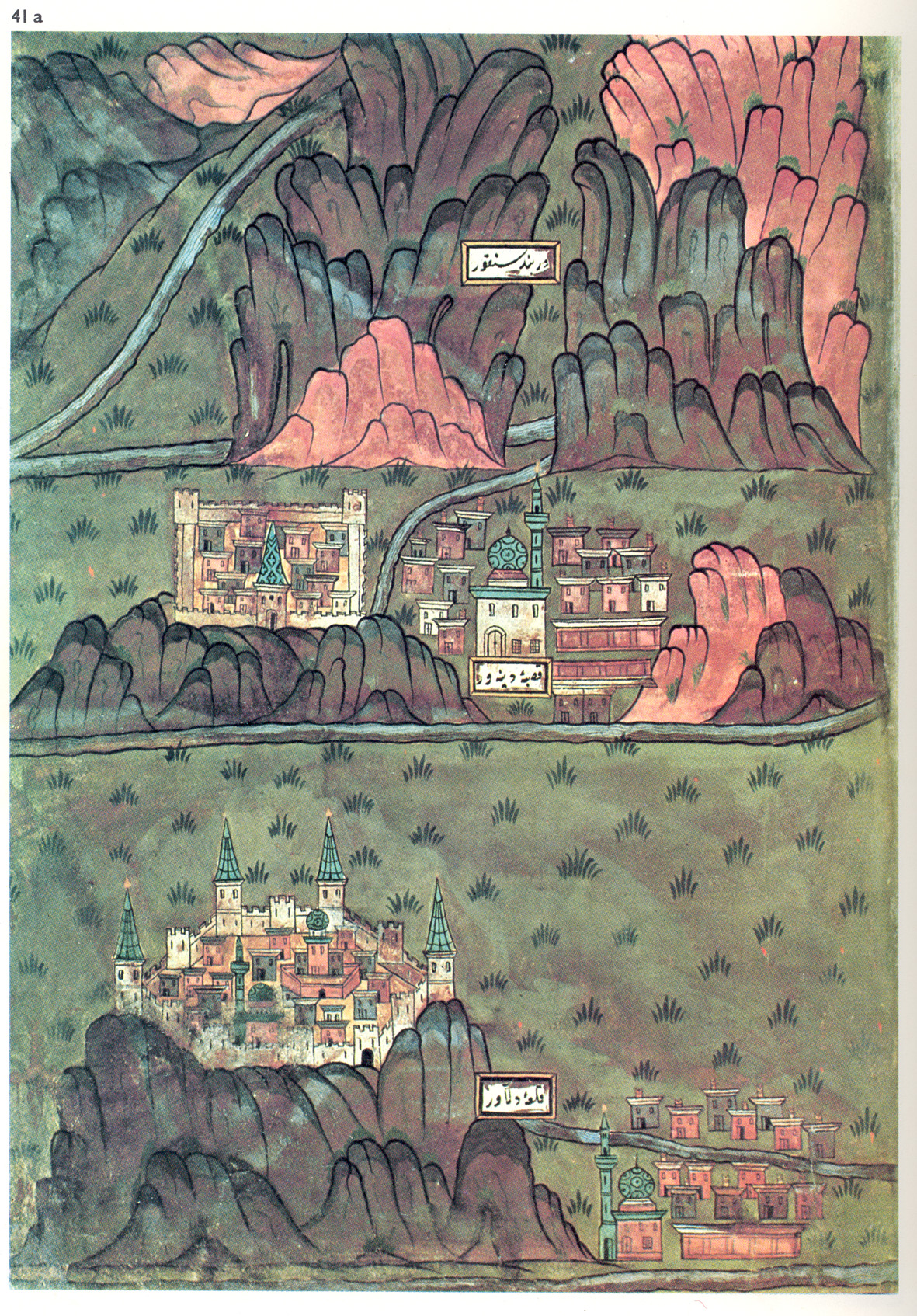 دربند سنقور/ قصبه دینه‌ور (دینور) قلعه دلاور